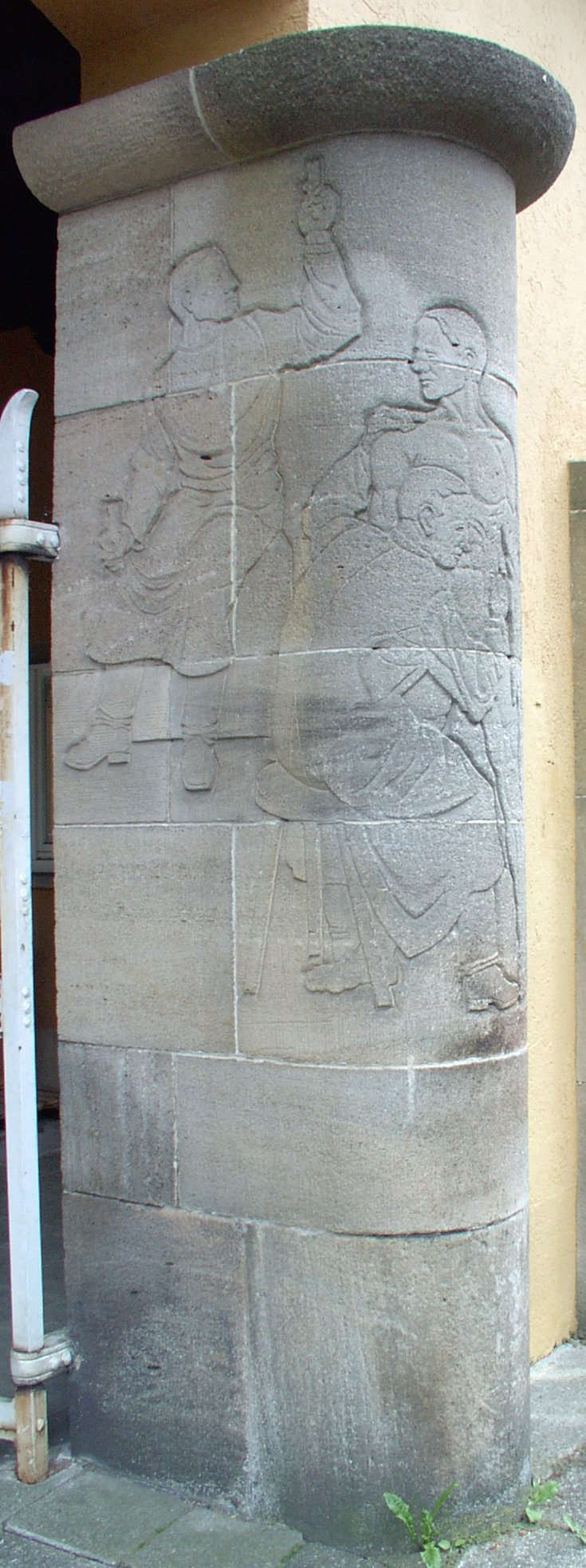 Eingangsportal des Sand-Gebäudes in Tübingen - rechts